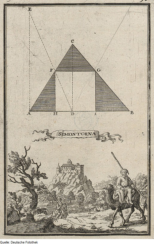 Original image description from the Deutsche FotothekGeometrie & Architektur & Festungsbau & Vermessung